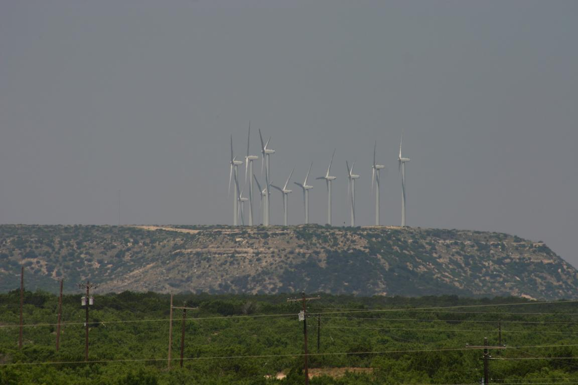 Wind Farm